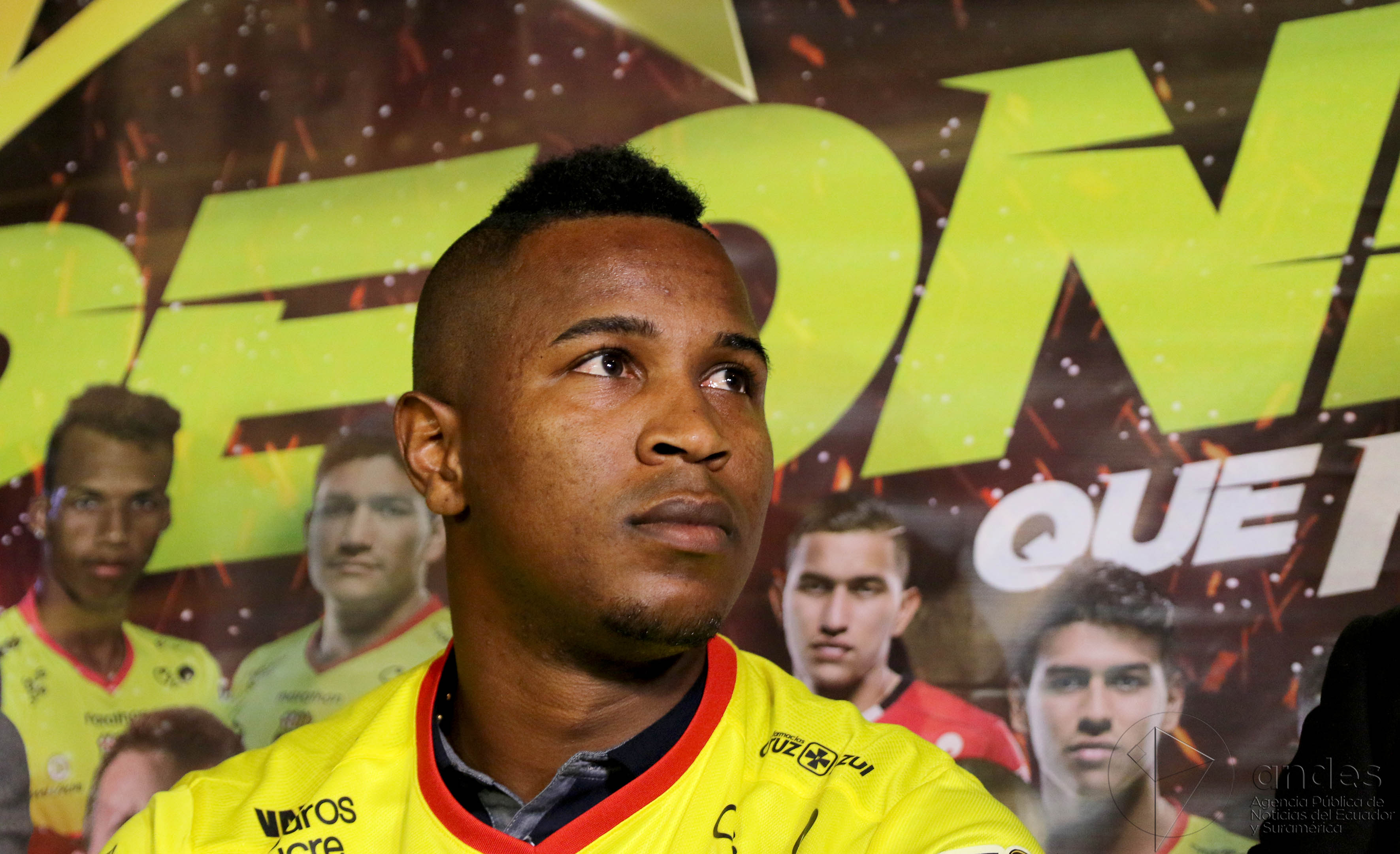 Guayaquil, lunes 09 de enero del 2017 (Andes).-El colombiano Jefferson Mena fue presentado por Barcelona, como refuerzo para la temporada 2017 del campeonato ecuatoriano. Foto:Andes/César Muñoz